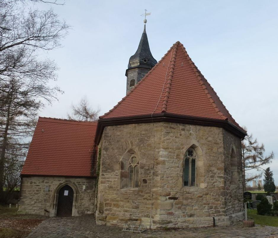 Kirche von Kirchfährendorf, rechts im Hintergrund Kühltürme von Leuna